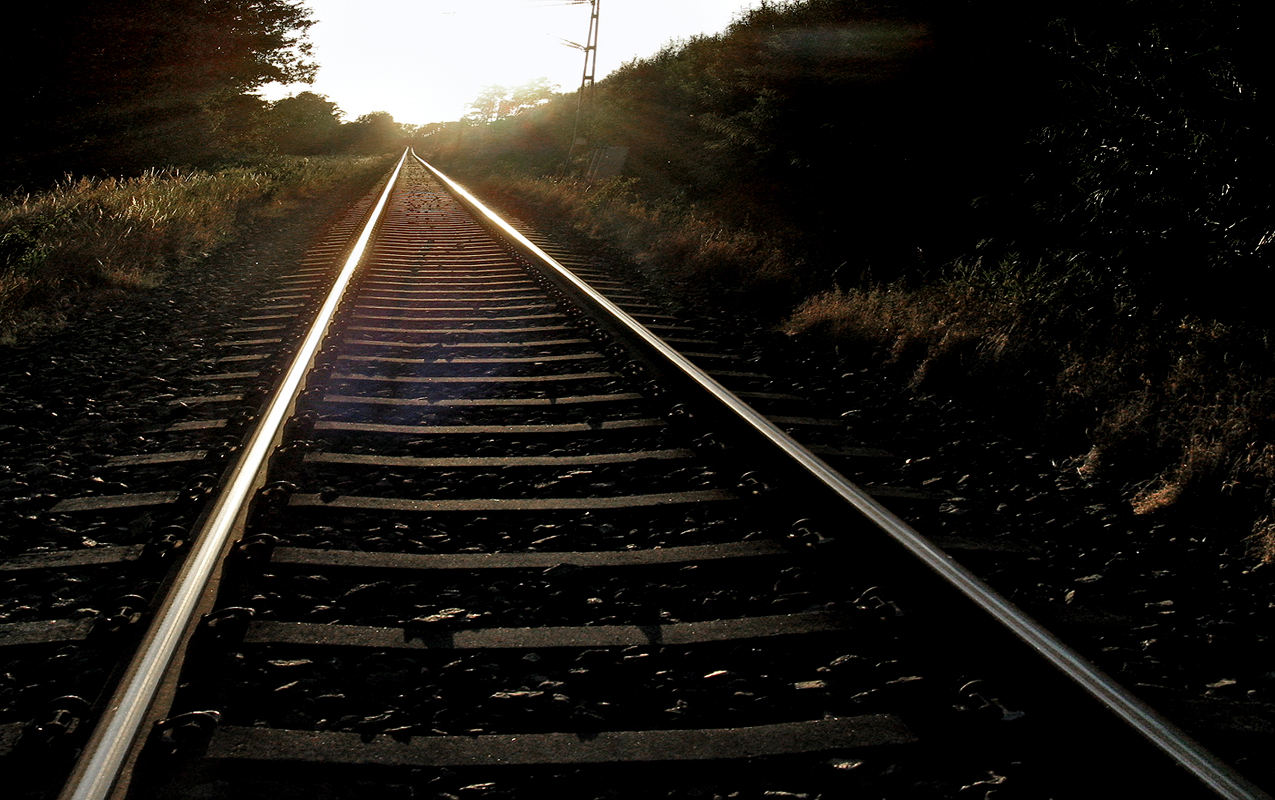 Järnvägsräls på betongslipers mellan Ystad och Svarte.